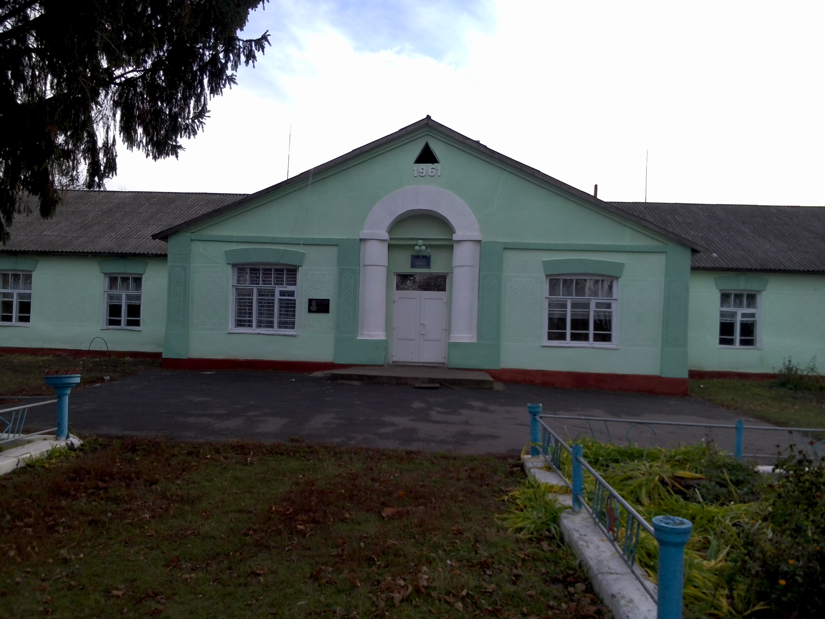 с. Вербівка. Школа